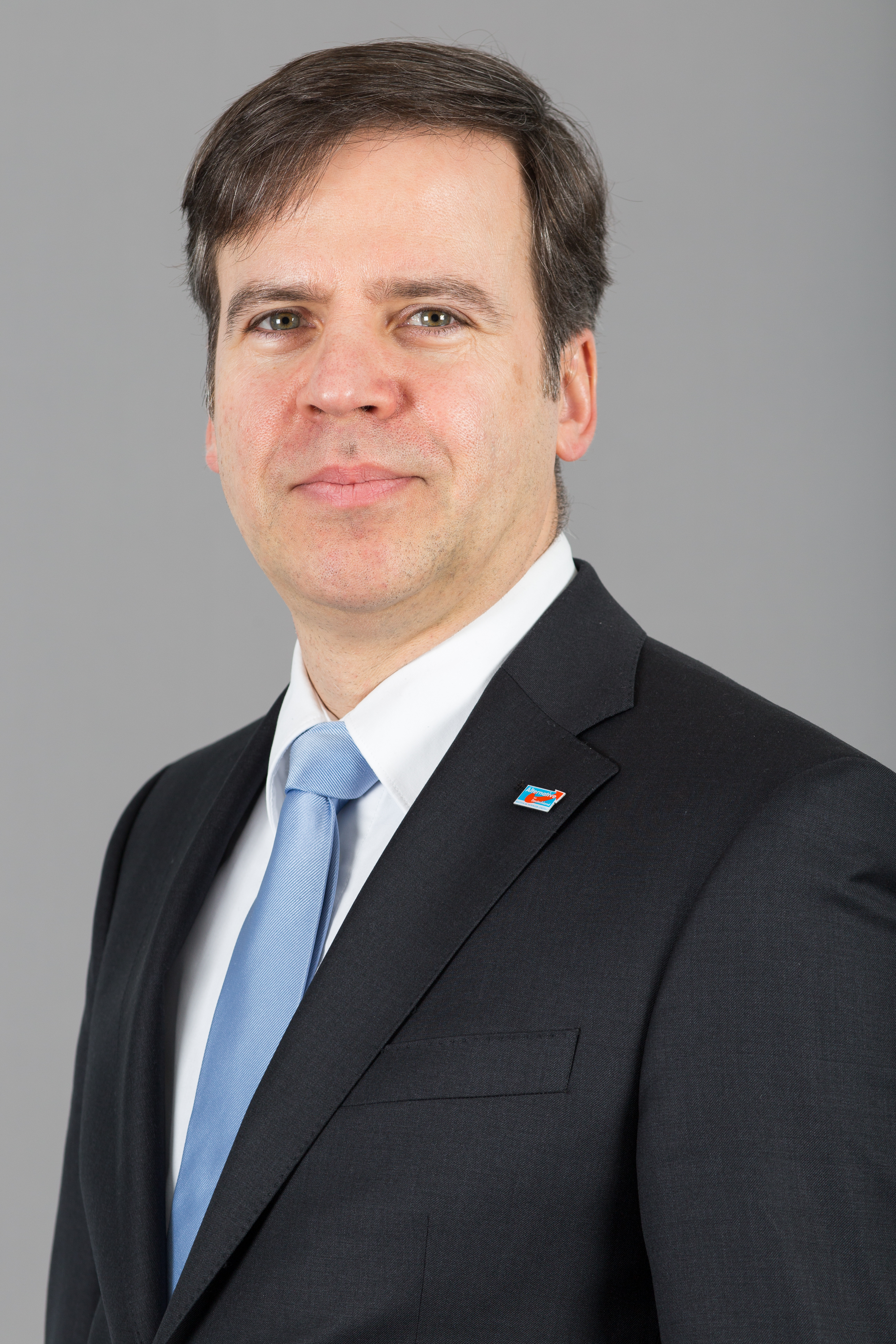 Olaf Kießling